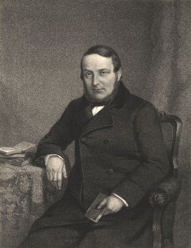 Agathon Benary (1809–1860), Lithographie von F. Hecht